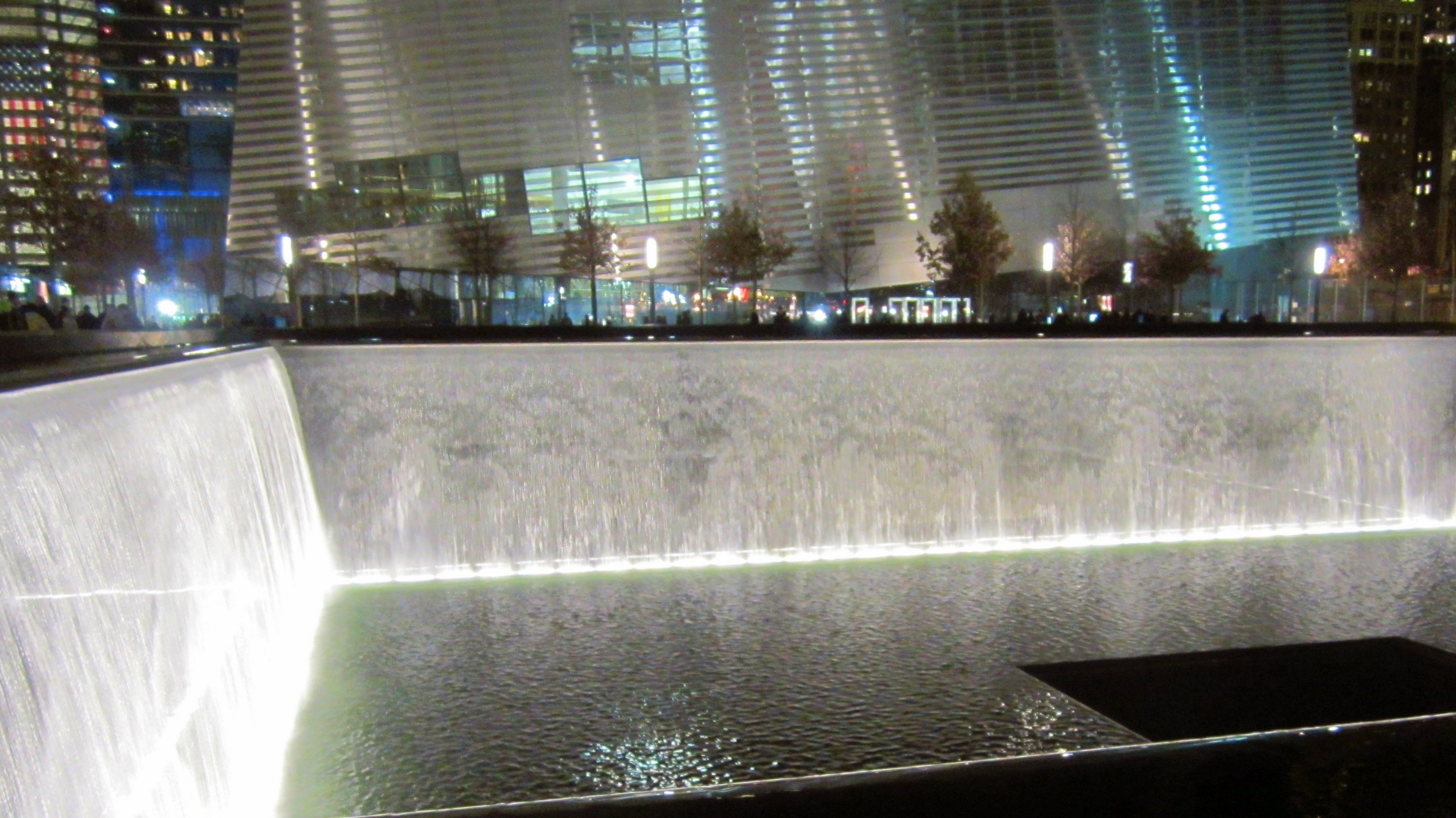 Die Gedenkstätte des World Trade Centers in New York City (USA) bei Nacht; südliches Becken und Museumsbau.